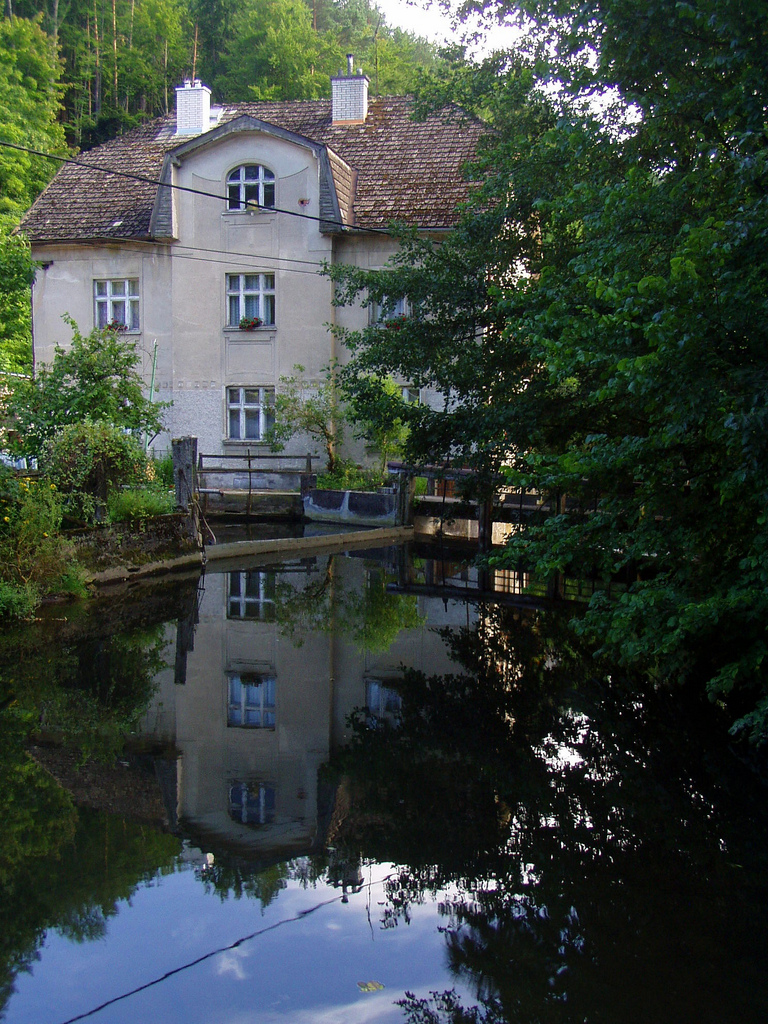 Podhora